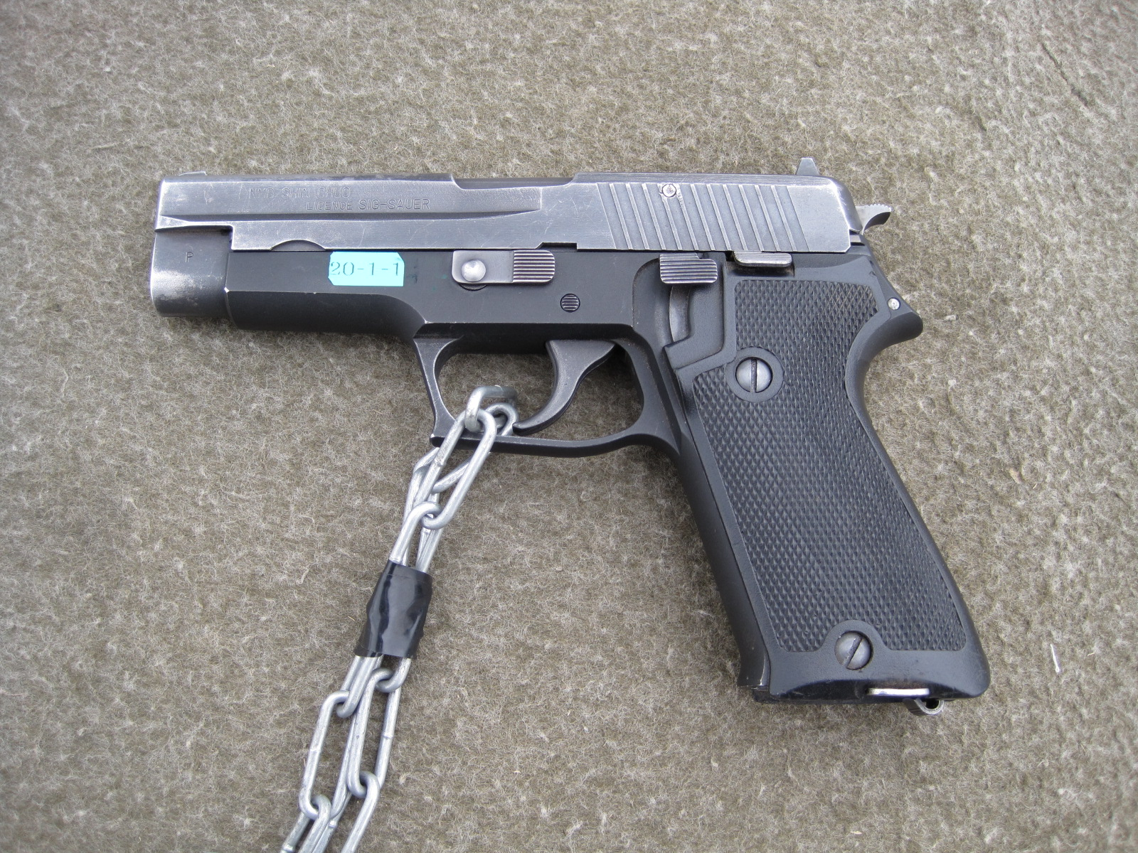 陸上自衛隊第6師団50周年記念行事にて展示される「9mm拳銃」